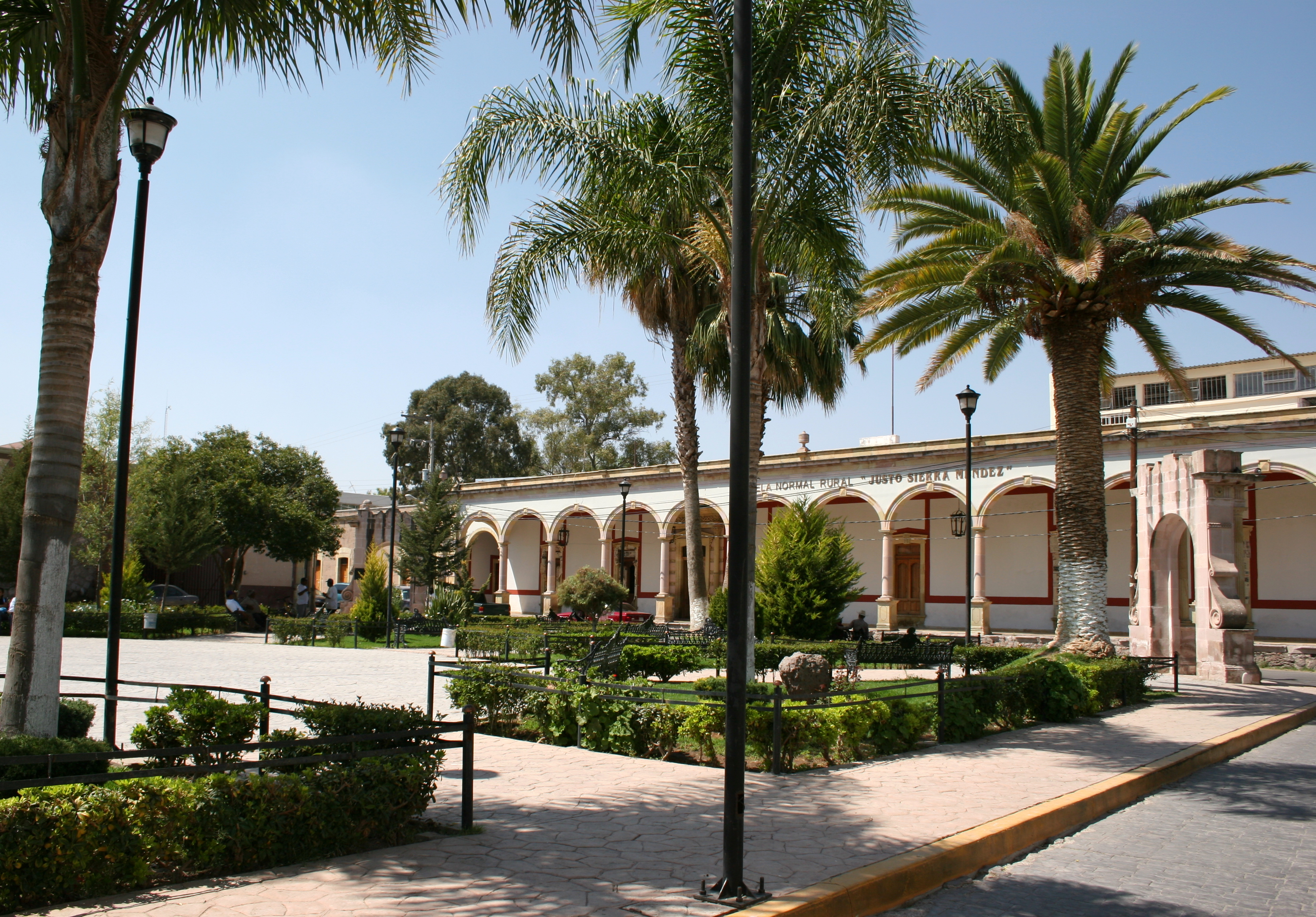 Escuela Normal Rural Justo Sierra Mendez, Ags